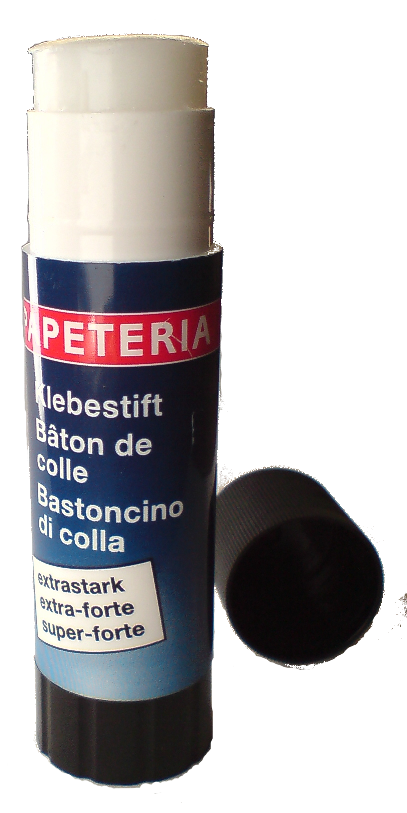 Ceci est une colle en bâton